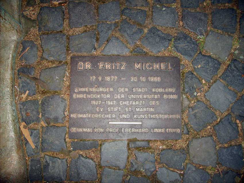 Denkmal für Fritz Michel. Plakette.